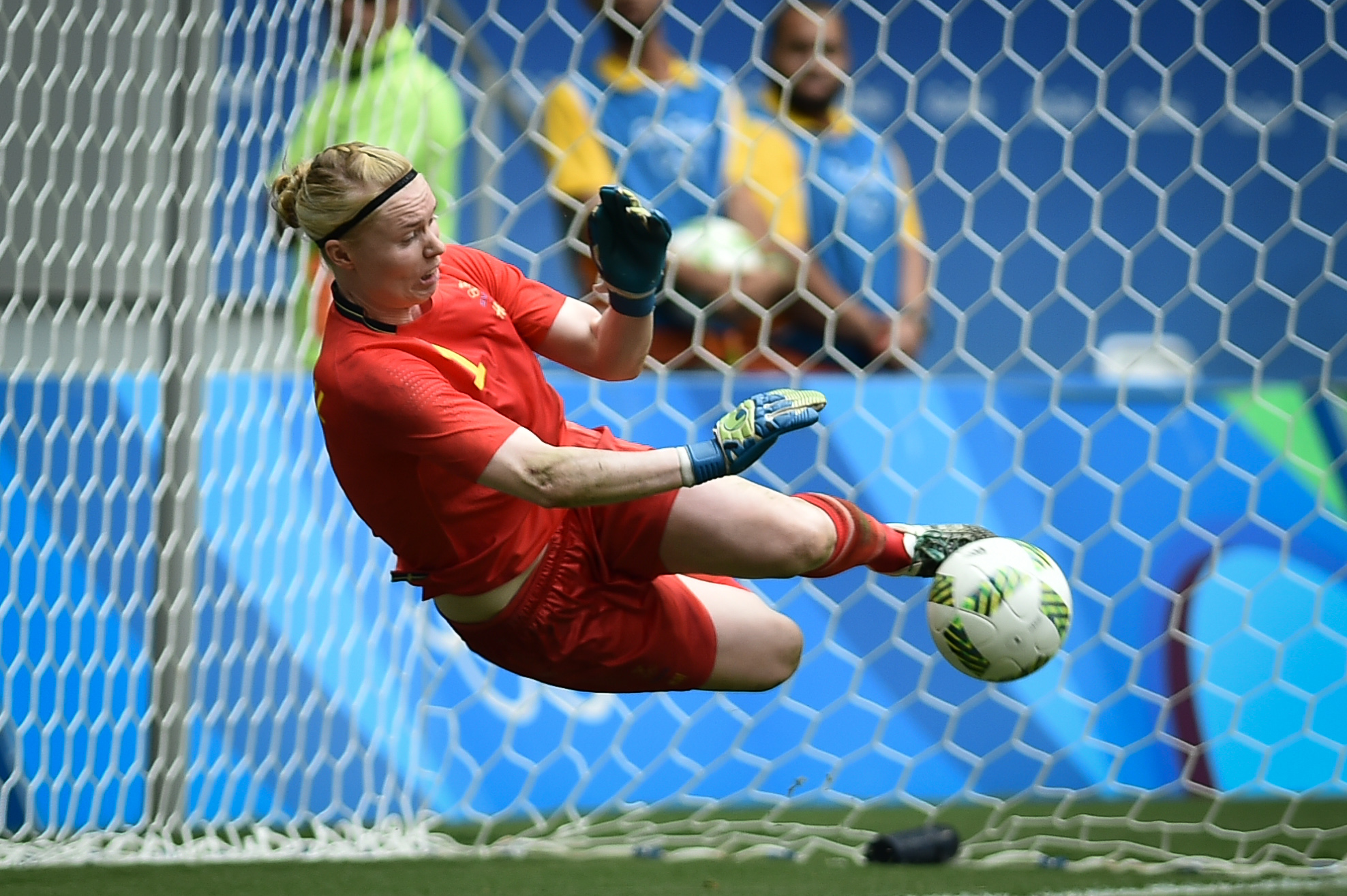 Estádio Nacional de Brasília Mané Garrincha, Brasília, DF, Brasil, 12/8/2016 Foto: Andre Borges/Agência Brasília. Estados Unidos e Suécia jogam nesta sexta-feira (12), no Estádio Mané Garrincha, pelas quartas de final do futebol feminino na Olimpíada 2016.